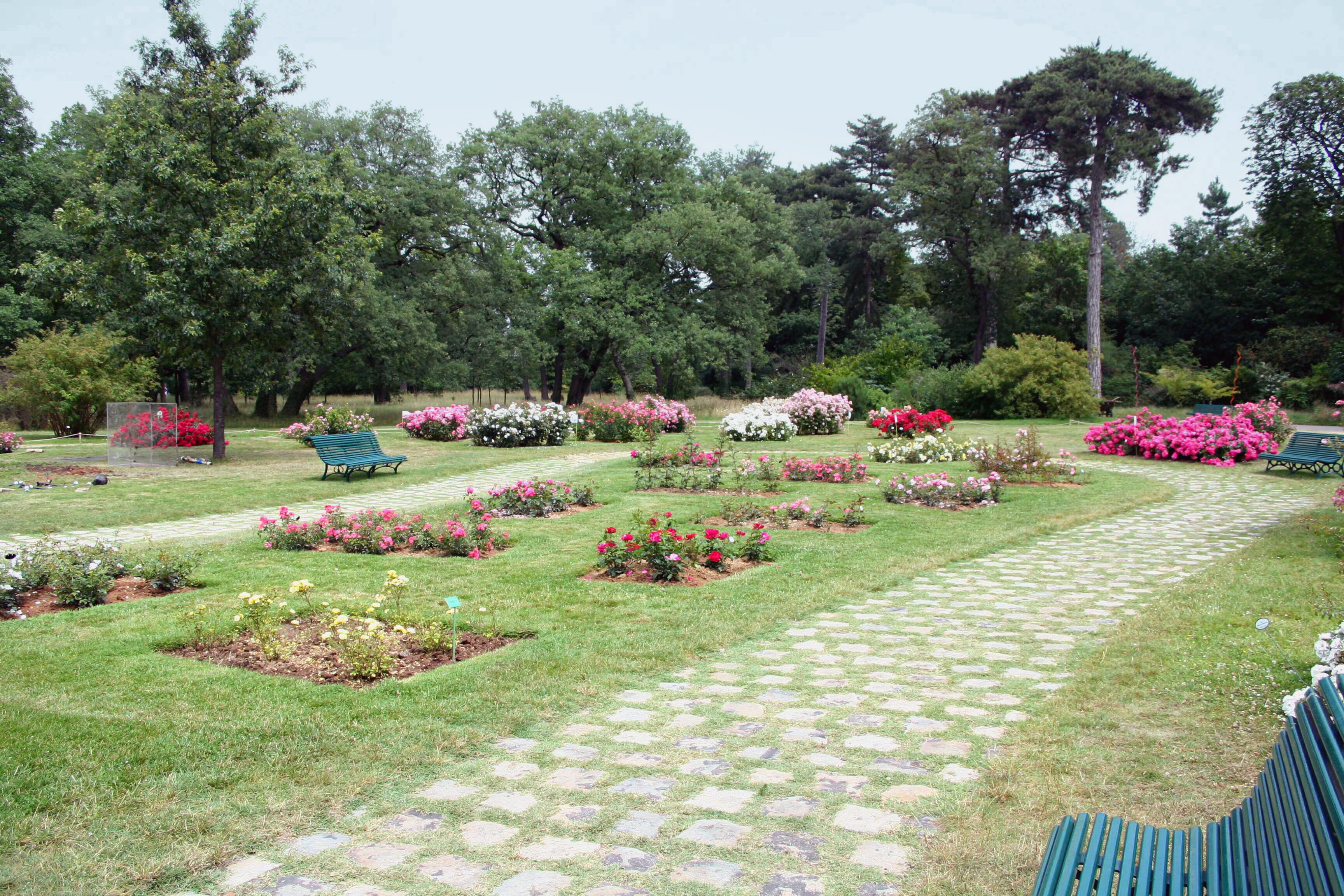 Roseraie de paysage de Bagatelle - Paris (France)